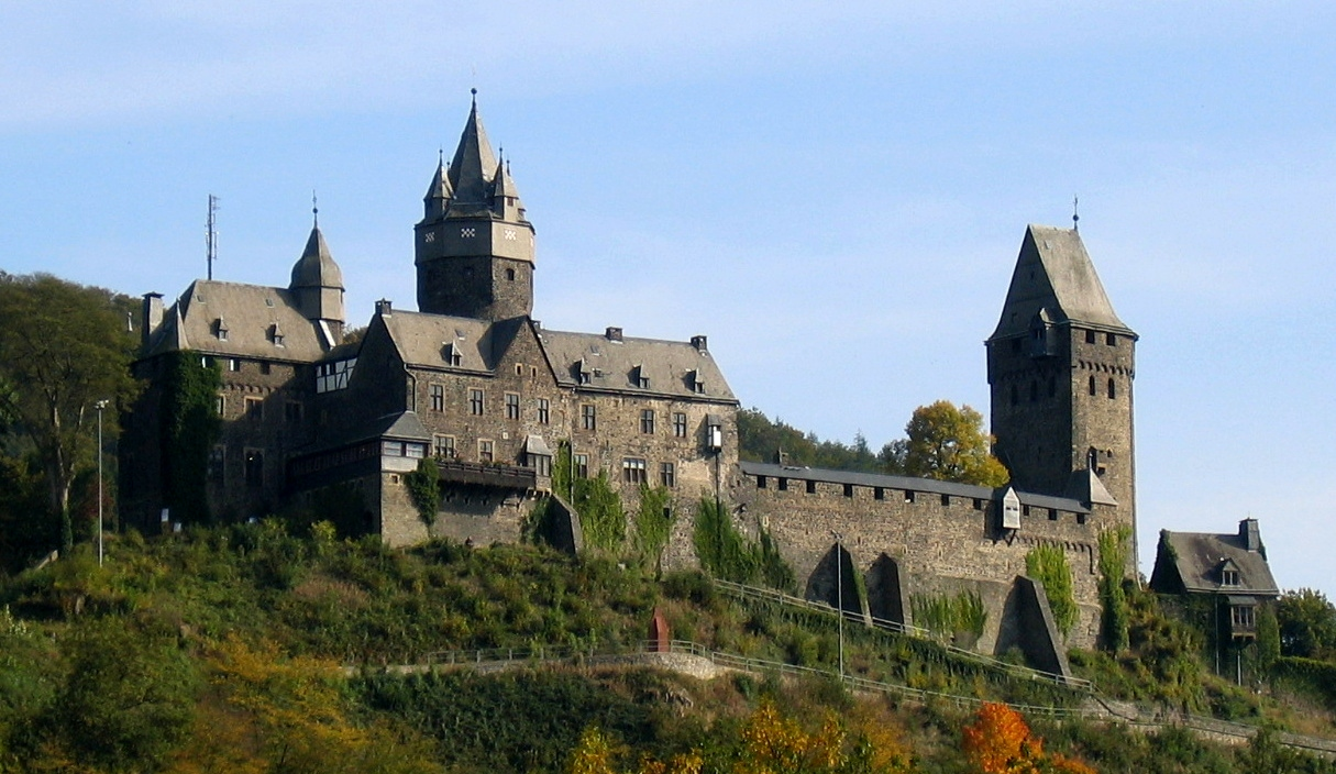 Description: Burg Altena (vermutlich Anfang 12. Jahrhundert) in Altena Source: selbst fotografiert Date: 9. Okt. 2005 Author: Asio otus